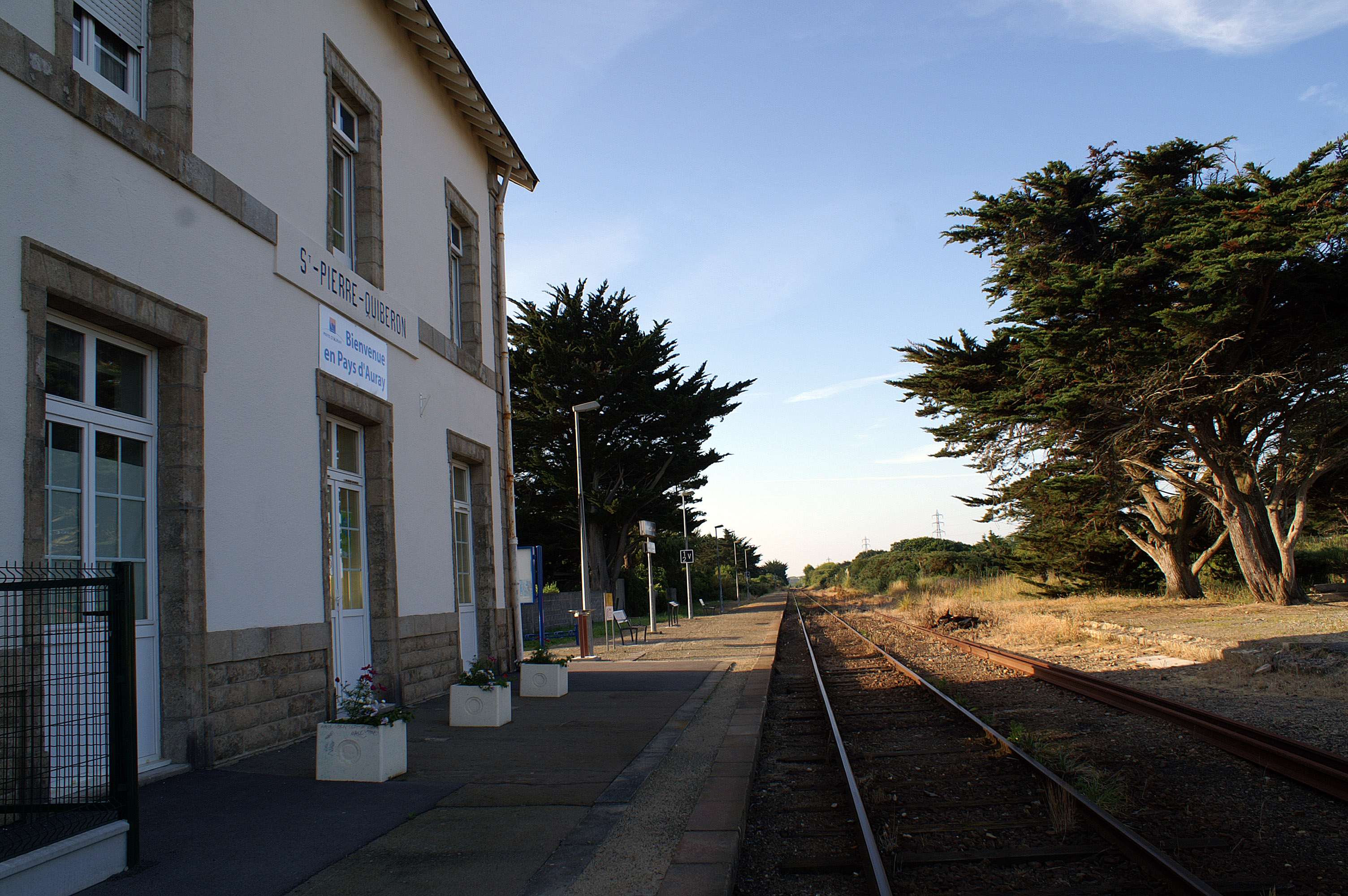 le côté intérieur de la gare de Saint-Pierre-Quiberon. On voit l'emplacement de l'ancienne voie de croisement équipée d'un quai.